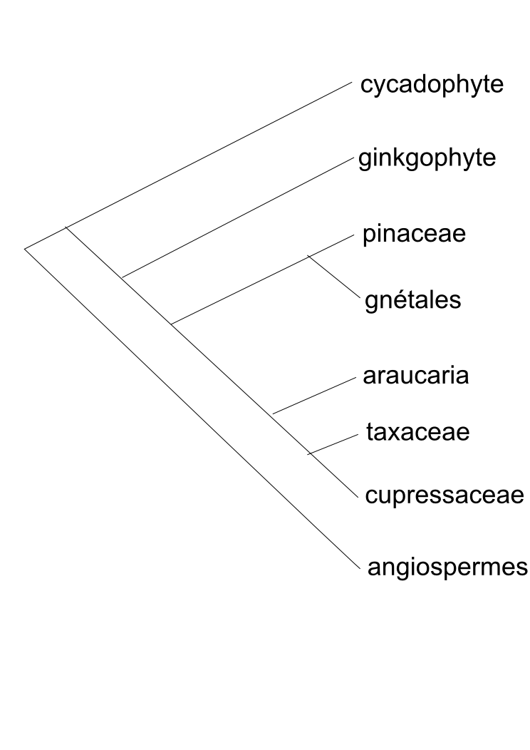 dendrogramme des spermaphytes